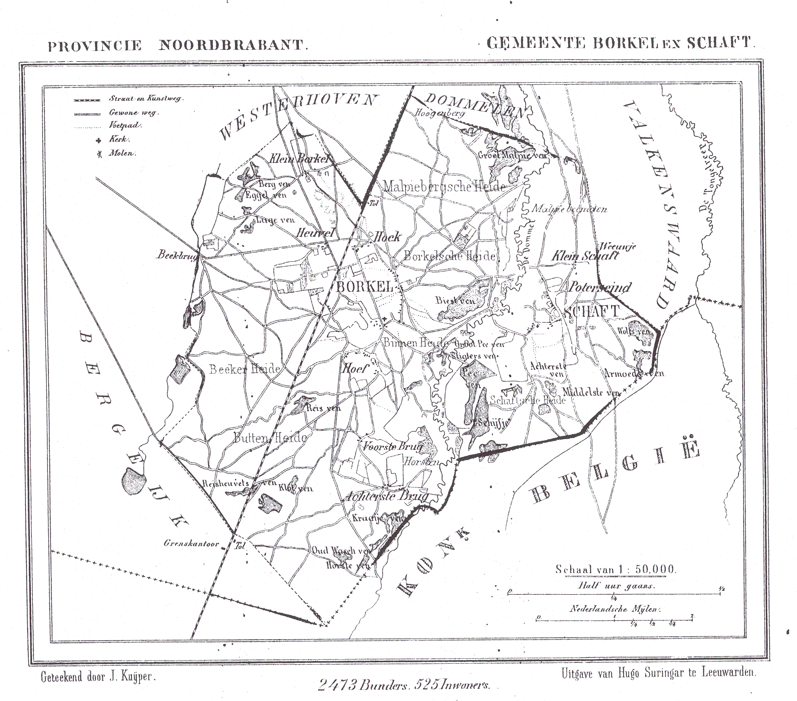 Nederland, Noord-Brabant, Gemeente Borkel en Schaft